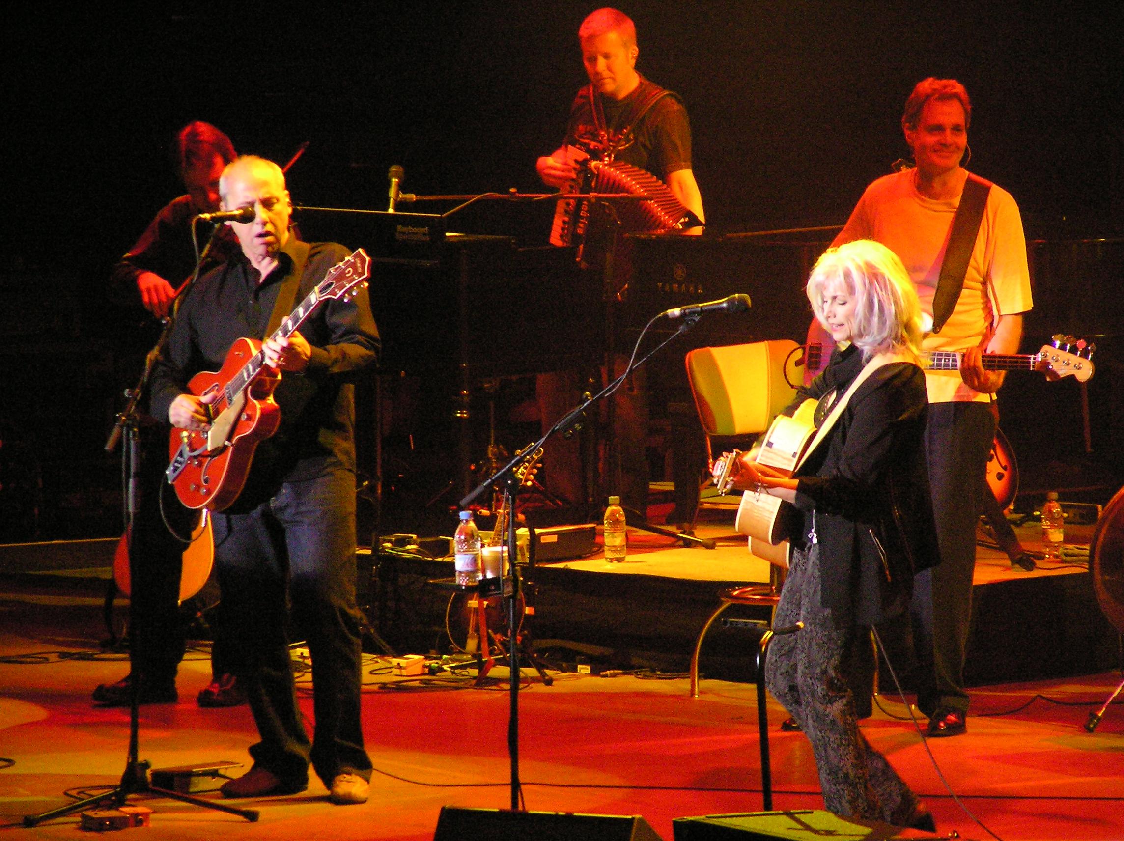 Mark Knopfler & Emmylou Harris Konzert Hamburg 28.05.2006